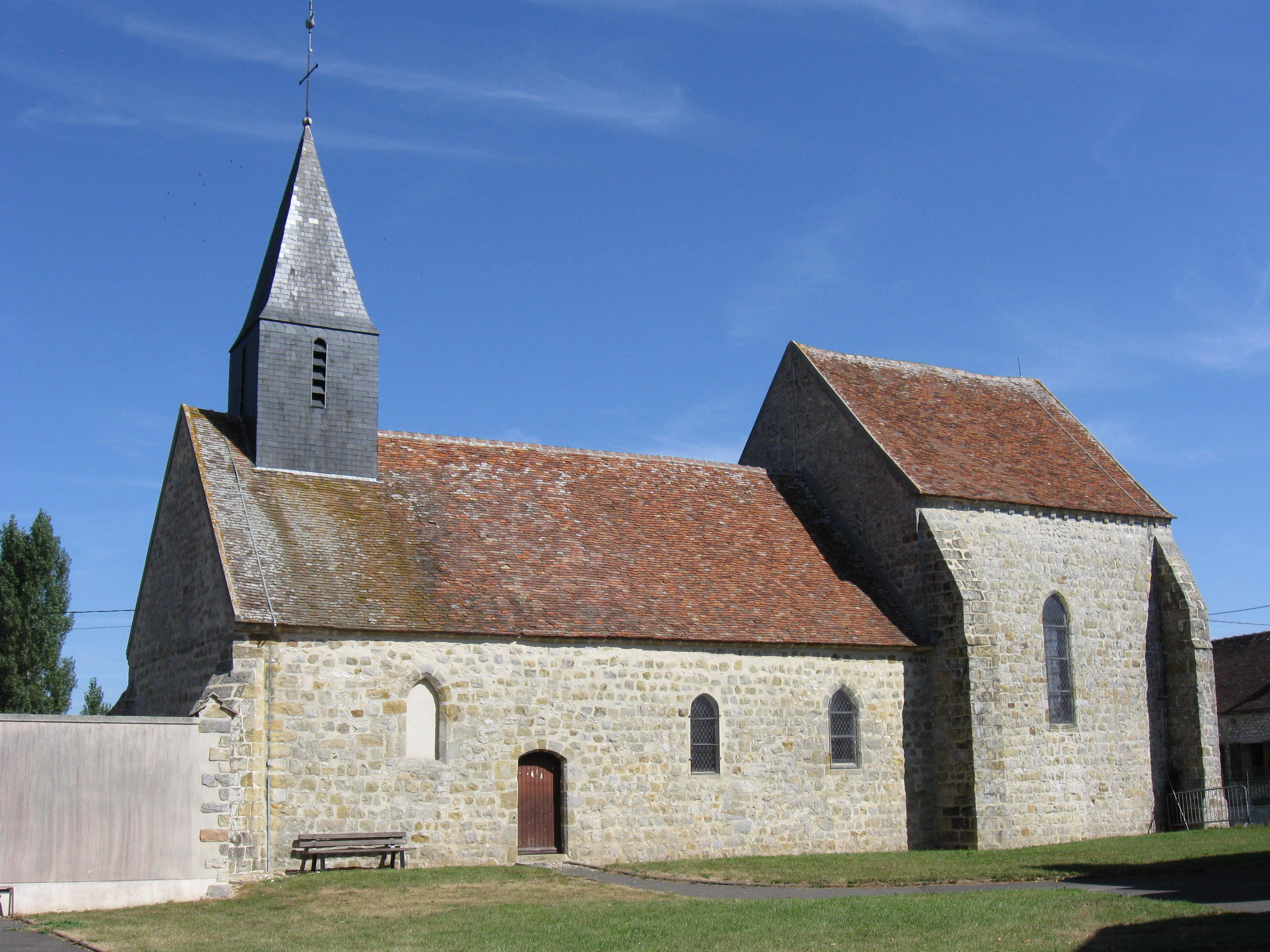 Église Saint-Léonard de Vanvillé. (département de la Seine et Marne, région Île-de-France).